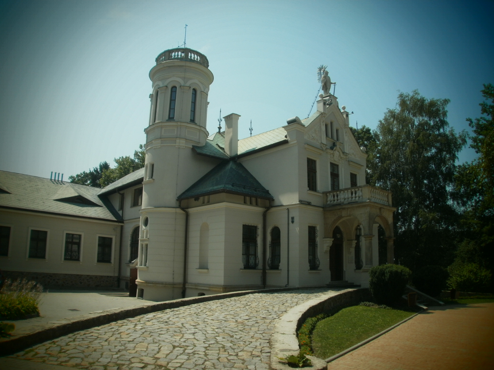 Oblęgorek, Aleja Lipowa 24 - Pałac (obecnie muzeum), 1900